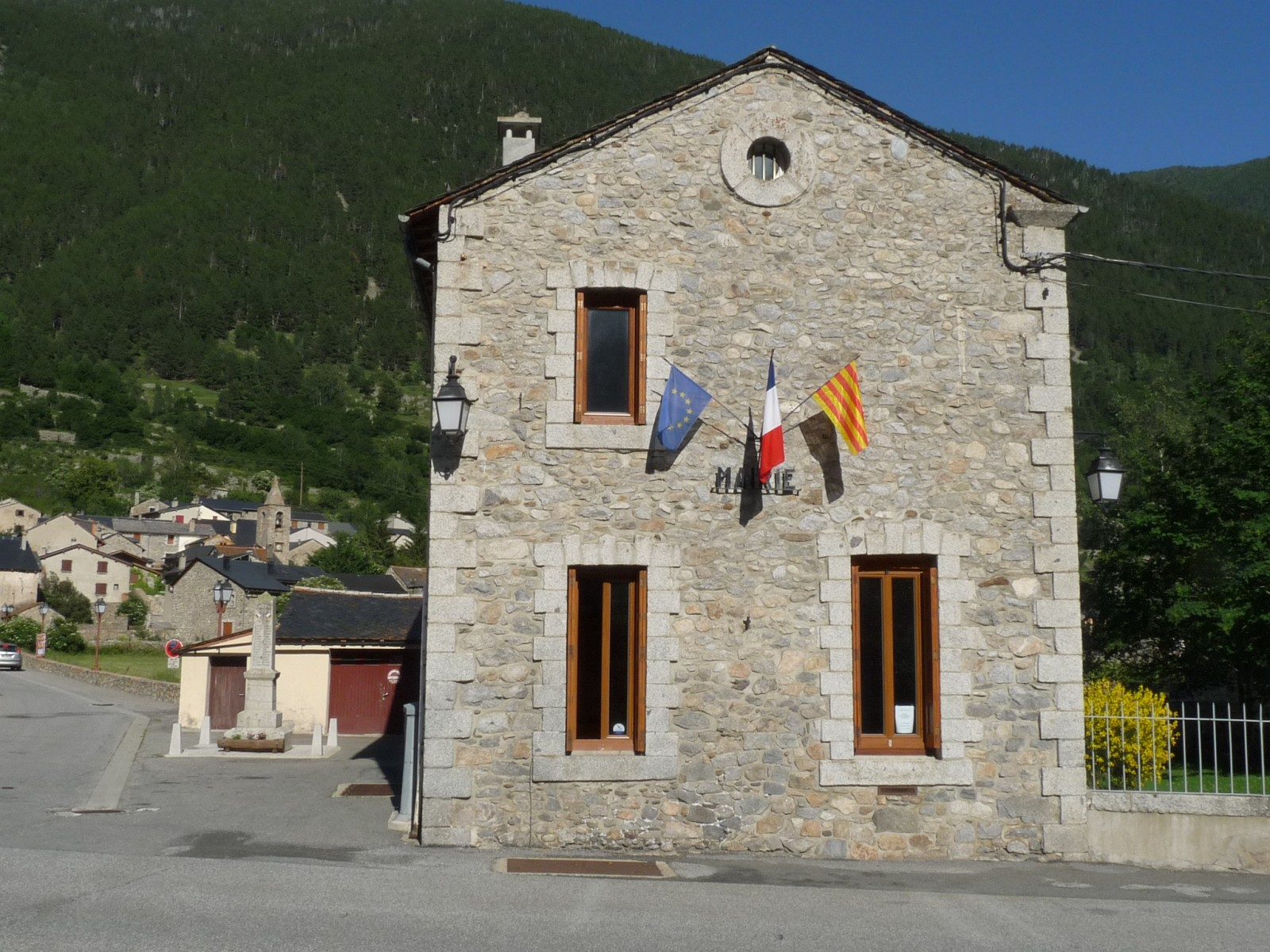 Mairie de Porta, Pyrénées-Orientales, France